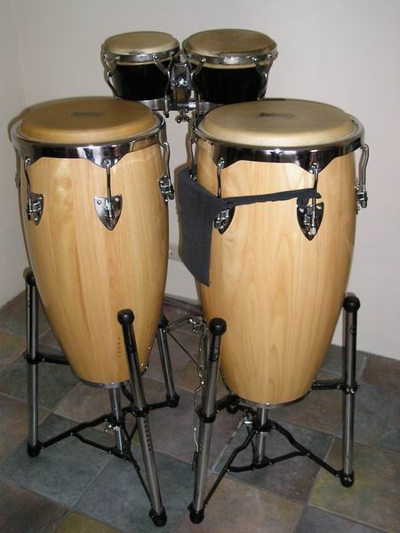 Mijn houten conga's en bongo's.